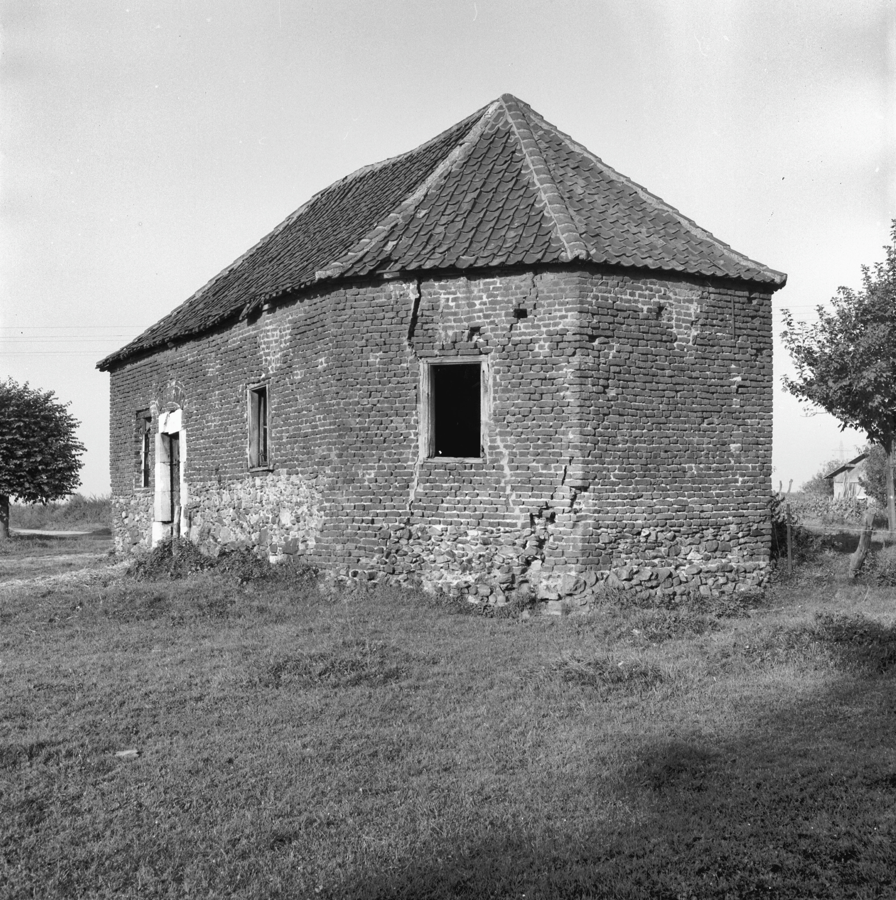 Voormalig Kapel: exterieur